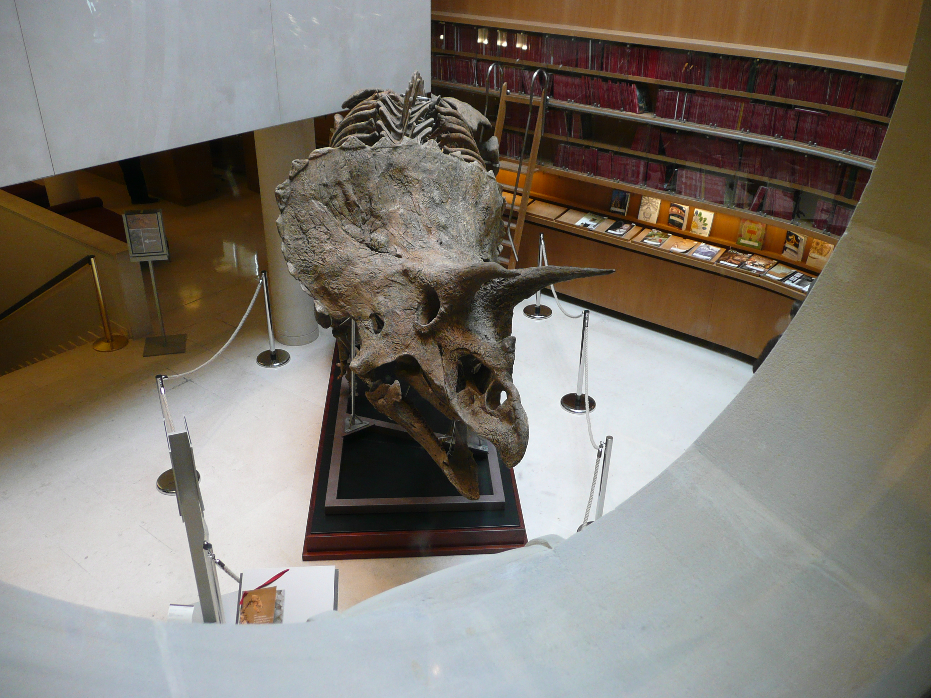 Un Tricératops